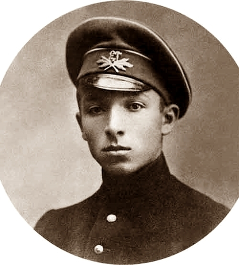 Илья Сельвинский — ученик евпаторийской гимназии 1910-е. Илья́ Льво́вич Сельви́нский (1899—1968) советский поэт